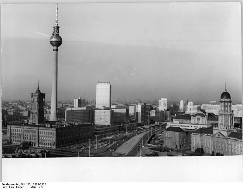 Berlin, Rotes Rathhaus, Gericht, Fernsehturm ADN-ZB Link 1.3.72 Berlin: Blick auf das neue Stadtzentrum der DDR-Hauptstadt - links das Rote Rathaus und der Fernsehturm, rechts daneben der Komplex der Neubauten an der Rathausstraße und das Hotel Stadt Berlin, rechts im Vordergrund das Gebäude des Ministerrats, links daneben das Oberste Gericht.